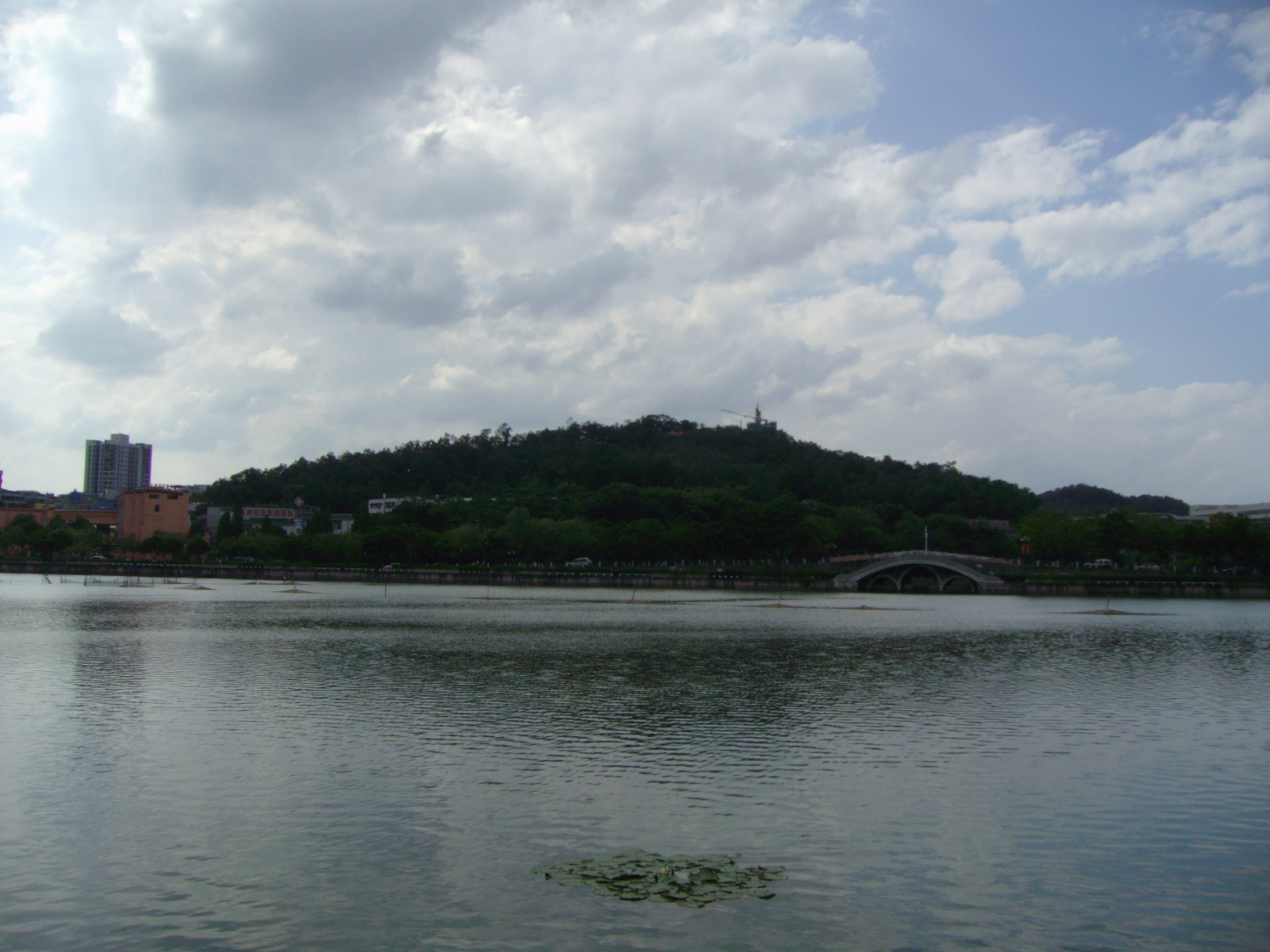 惠州飞鹅岭